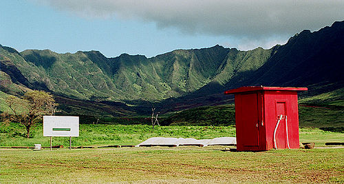 Makua Valley military testing area, Oahu, Hawaii.